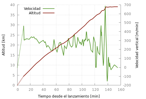 Gráfico de la altitud de la cápsula durante el tiempo de vuelo.